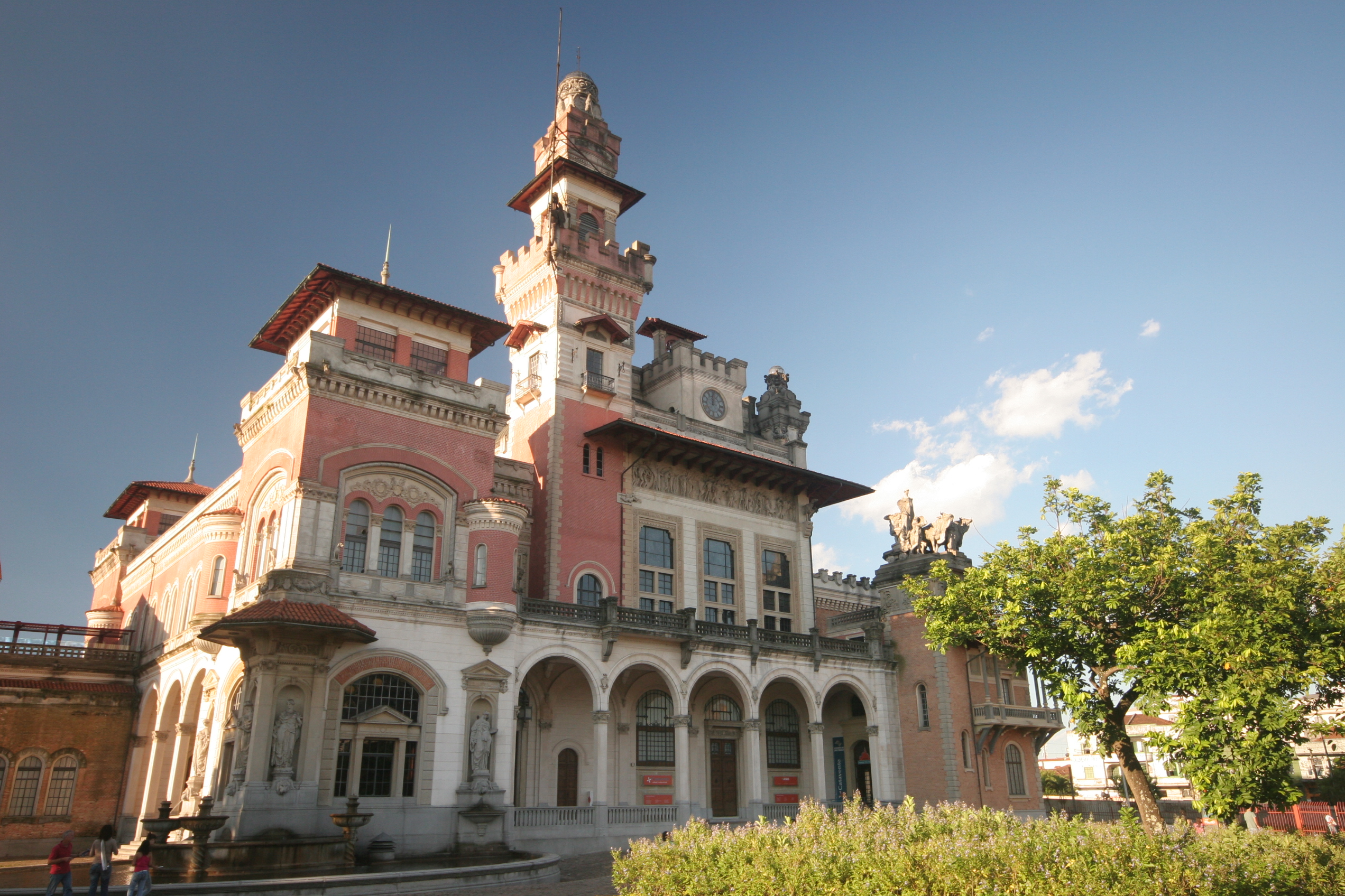 Palácio das Indústrias, em São Paulo, Brasil.